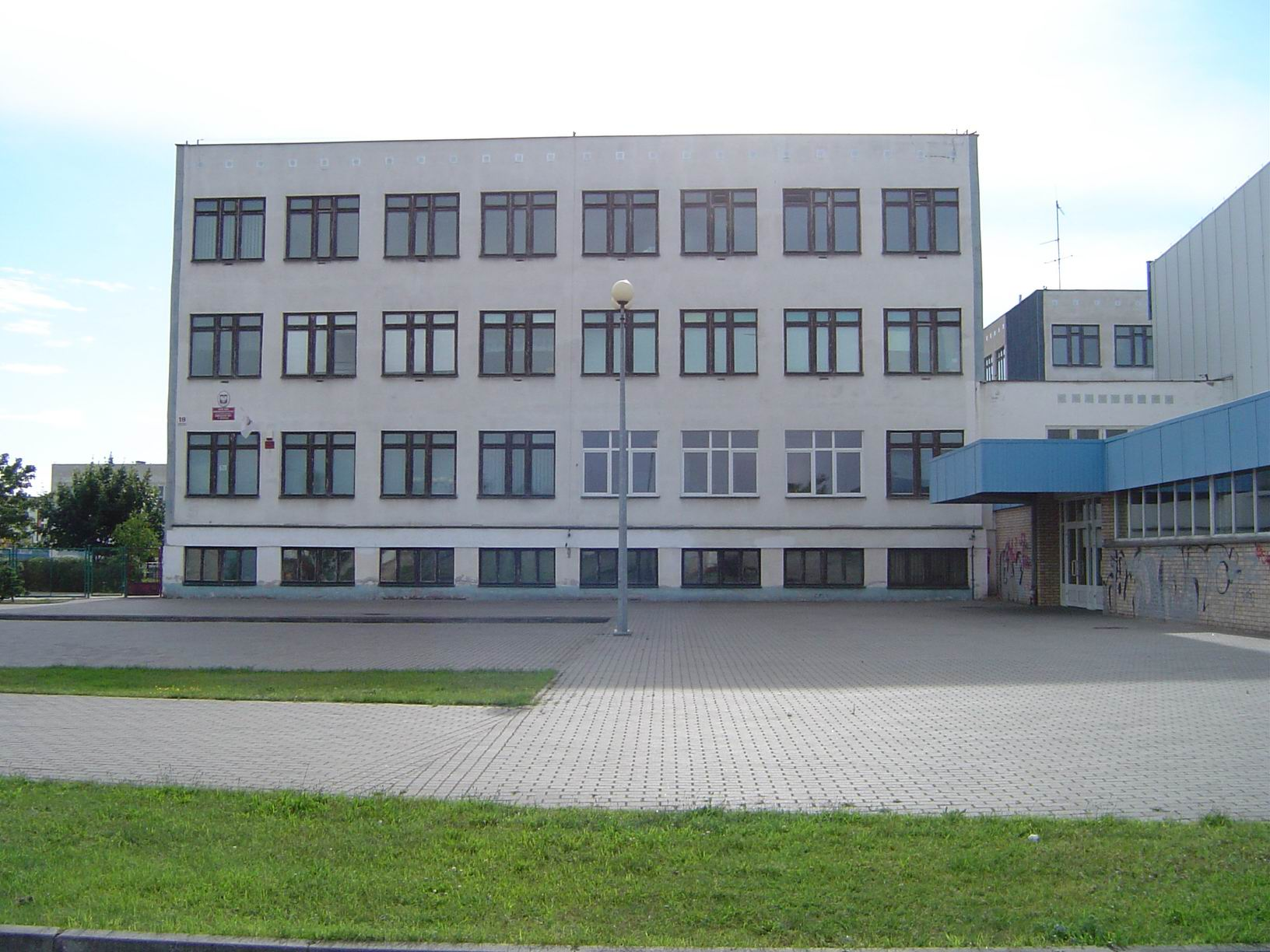 Gimnazjum nr 5 w Grudziądzu